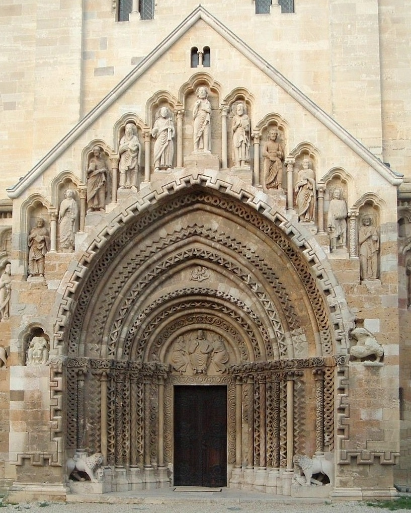 Portal der romanischen St.-Georgs-Kirche in Ják